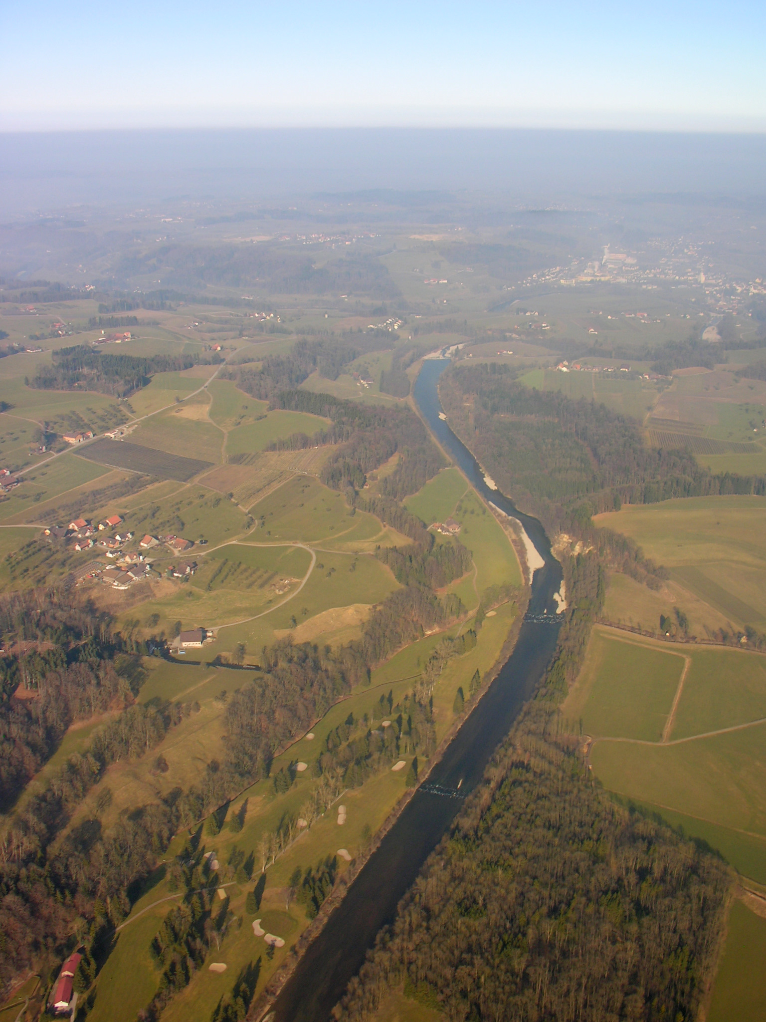 Aerial View overhead Niederbüren